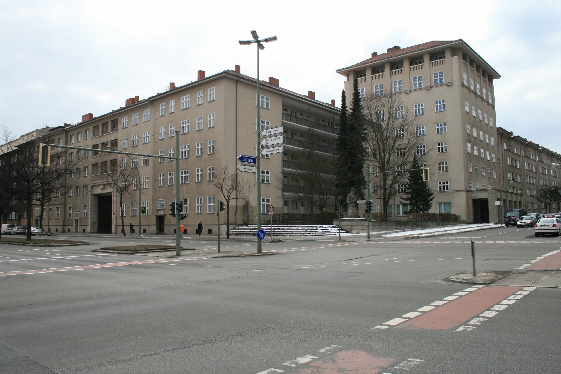 Berlin-Westend, Königin-Elisabeth-Straße Ecke Knobelsdorffstraße. Wohnanlagen und ehem. Straßenbahn-Betriebshof; Wohnanlage.